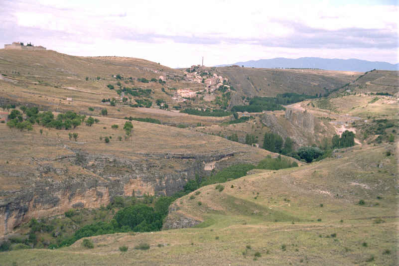 Hoces del río Duratón en Sepúlveda (Segovia, España). Tomada por --JMSE el 2 de julio de 2003 y cedida a Wikipedia.